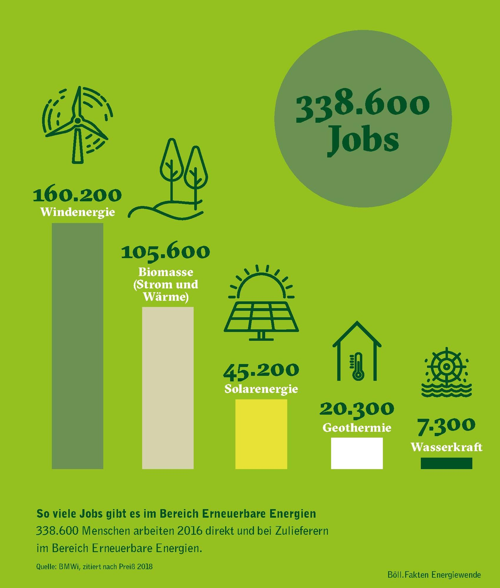 „Energiewende: Siebzehn Richtigstellungen zur Stromversorgung“ – Fakten und Argumente zur Diskussion um Erneuerbare Energien bzw. die Energiewende in Deutschland. URL Shortener für diese Seite: PDF: „Dieses Werk steht unter der Creative-Commons-Lizenz CC BY-SA 4.0“ - siehe Seite 43 (PDF-Seite 22) Vorwort: „Die Menschen in Deutschland stehen mit großer Mehrheit zur Energiewende. Das ökonomische, ökologische und soziale Potenzial der Energiewende ist riesig. Der Umstieg auf Erneuerbare Energien und auf ein flexibles Stromversorgungssystem ist der Grundpfeiler für die ökologische Modernisierung des Industriestandortes Deutschland. Eine klimafreundliche Stromversorgung hilft, die Grundlagen für menschliches Leben auf diesem Planeten zu erhalten. Die Energiewende kann in sozialer Hinsicht doppelt wirksam sein: Erstens schafft sie viele Beteiligungsmöglichkeiten, vor Ort und in digital vernetzten Strom-Gemeinschaften. Zweitens ist nachhaltige Stromversorgung ein Kernelement der Klimagerechtigkeit. Die Energiewende hat ein Riesenpotenzial, ist aber auch sehr komplex und wirft viele Fragen auf. Die politische Umsetzung der Energiewende wird vielfach kritisiert: Der Plan, der Weg und die Technik seien oftmals unklar, die Verteilungswirkungen werden als unausgewogen empfunden. Deswegen haben wir in sozialen Medien recherchiert, was alles unklar ist, was Unbehagen und Zweifel verursacht. Unser Anliegen ist es, das allgemeine Wissen über die Energiewende zu erweitern. Wir wollen Mut und Zuversicht für eine sozial ausgewogene, ökologisch nachhaltige und wirtschaftlich erfolgreiche Energiewende geben. Denn wir brauchen die Energiewende und arbeiten deshalb mit daran, dass sie ein Erfolg wird.“ Stefanie Groll, Referentin für Ökologie und Nachhaltigkeit, Heinrich-Böll-Stiftung Doris Lorenz, Vorstand der Heinrich-Böll-Stiftung Schleswig-Holstein